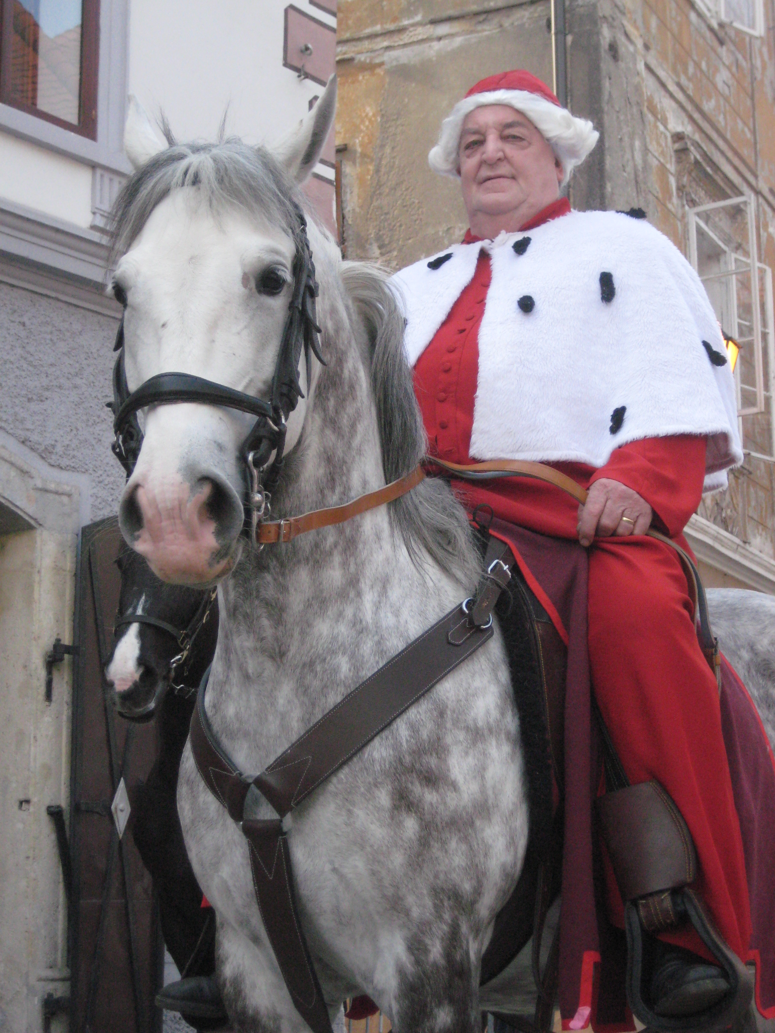 Škofjeloški pasijon (Processio Locopolitana), izvedba 2009 v Škofji Loki